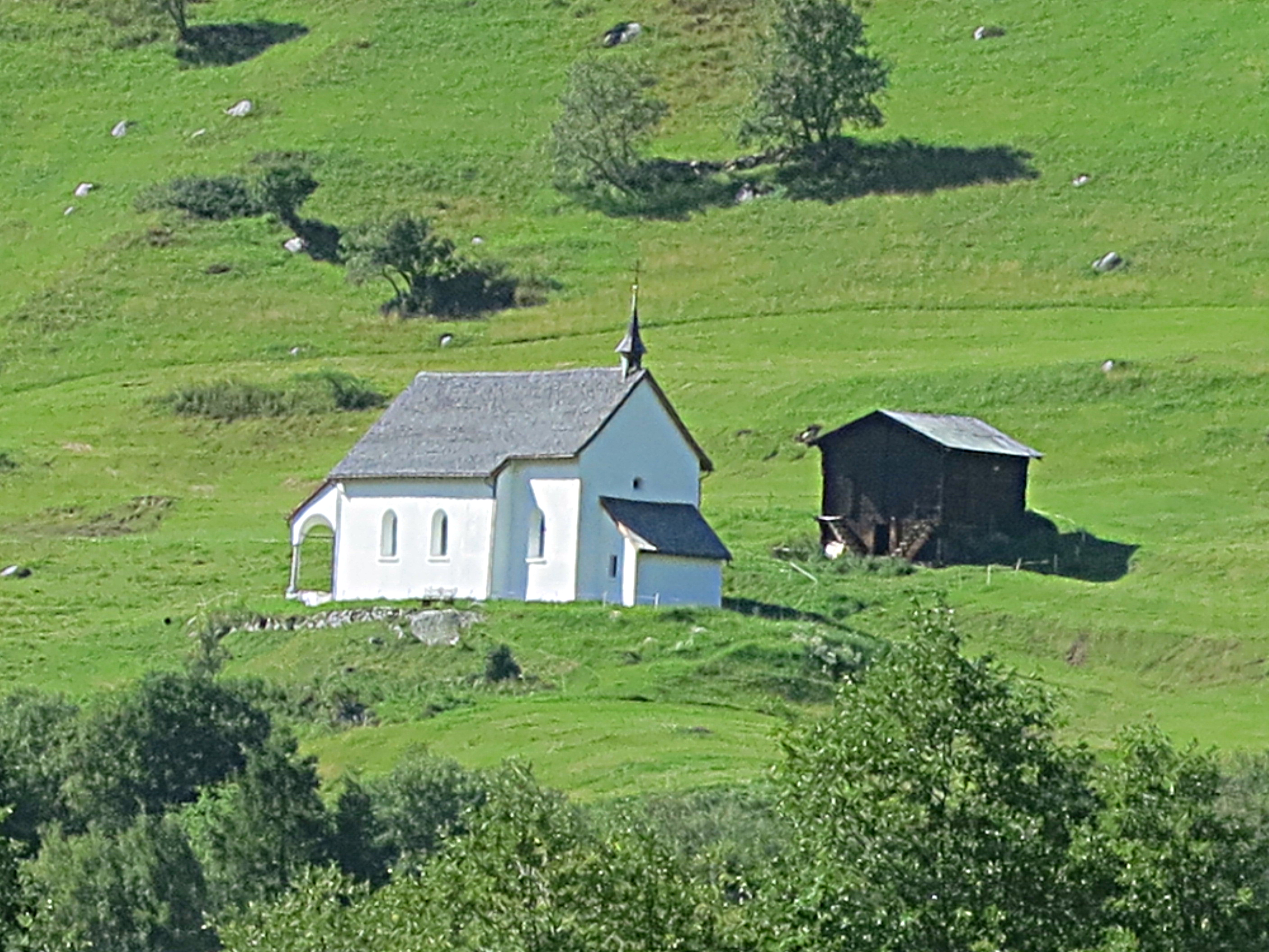 Kapelle, Wiler, Münster-Geschinen VS, Schweiz